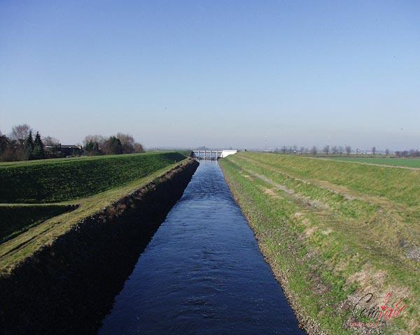 Emschermündung "Am Stapp" in Dinslaken